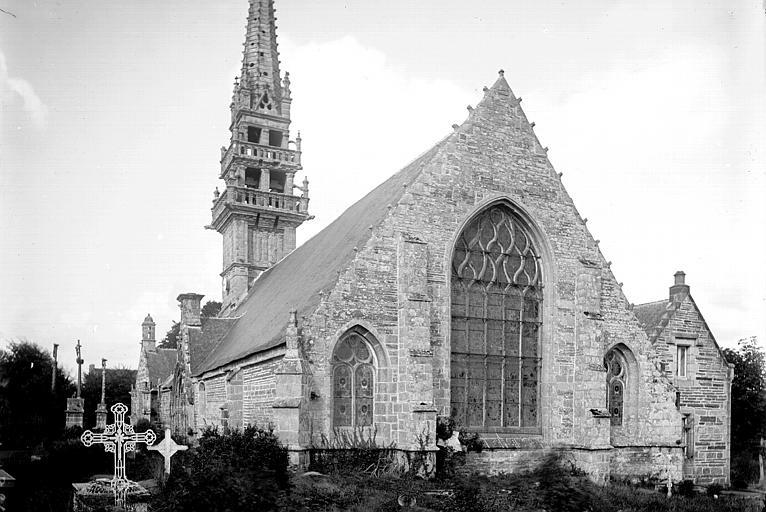 La Roche-Maurice : l'église Saint-Yves (photo d'avant 1897, Félix Martin-Sabon